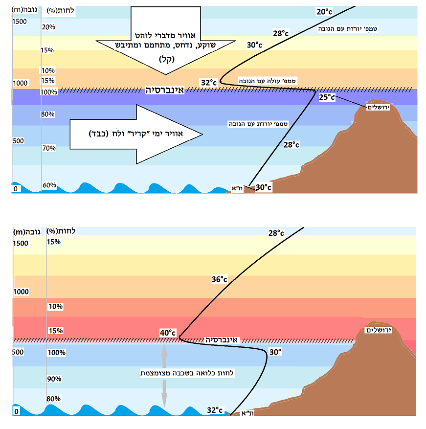 תיאור סכמטי של המצב הקייצי הנפוץ באזור ישראל: אוויר קריר יחסית ולח מהים התיכון כבד יותר מזה היבש והחם המתמוכך מעליו. מפל הטמפ' בגבול שבין שתי השכבות הפוך (התחממות עם העליה בגובה), ולכן נקראת שכבה זו אינוורסיה (היפוך). כשהאפיק הפרסי מתעמק והזרימה הימית המערבית - צפון מערבית בהשראתו נהיית דומיננטית יותר - האוויר הימי נדחף עמוק לפנים הארץ, שכבת האינוורסיה מגביהה, הלחות בחוף, יורדת ובהרים עולה, הטמפ' יורדות. במצב בו האפיק הפרסי נחלש, הזרימה הימית הלא מפותחת משאירה את שדירת ההר והאזורים הפנימיים של הארץ בתחום האוויר המתמוכך החם והיבש, ומישור החוף נמצא בתחום האוויר הימי שנכלא בשכבה מצומצמת יותר עקב האינוורסיה הנמוכה ומזג האוויר שם יהיה חם והביל.